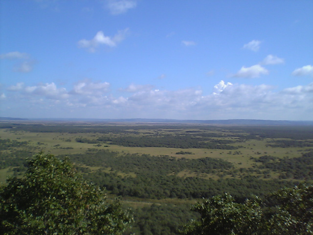 Kushiro Shitsugen, Hokkaido, Japan